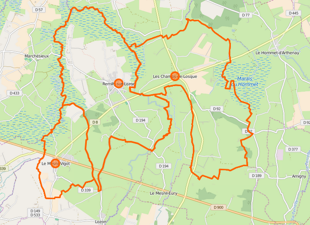 carte de la commune nouvelle et de ses communes déléguées